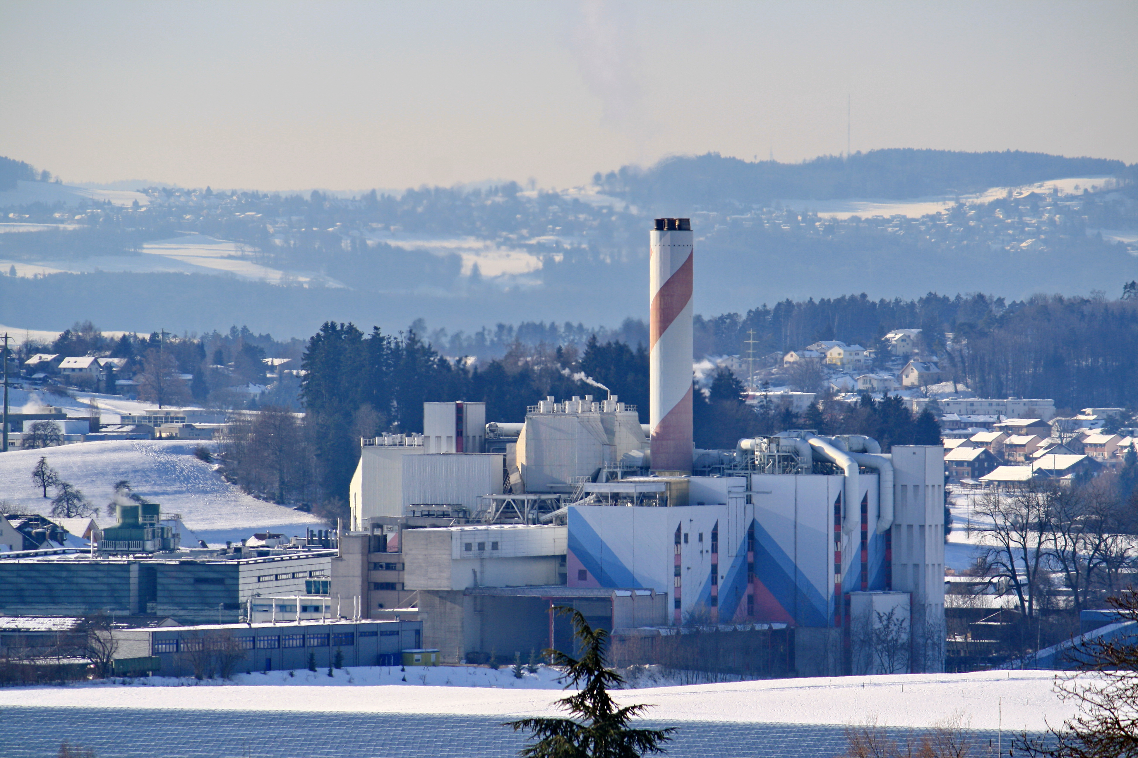 Kehrichtverbrennungsanlage Zürcher Oberland (KEZO) Hinwil (Switzerland), as seen from Ringwilerstrasse in Hinwil (Switzerland), Pfannenstiel (to the left) and Forch respectively Wetzikon in the background.